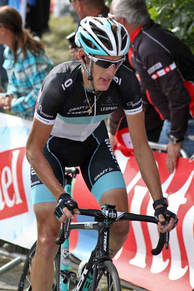 Andy Schleck